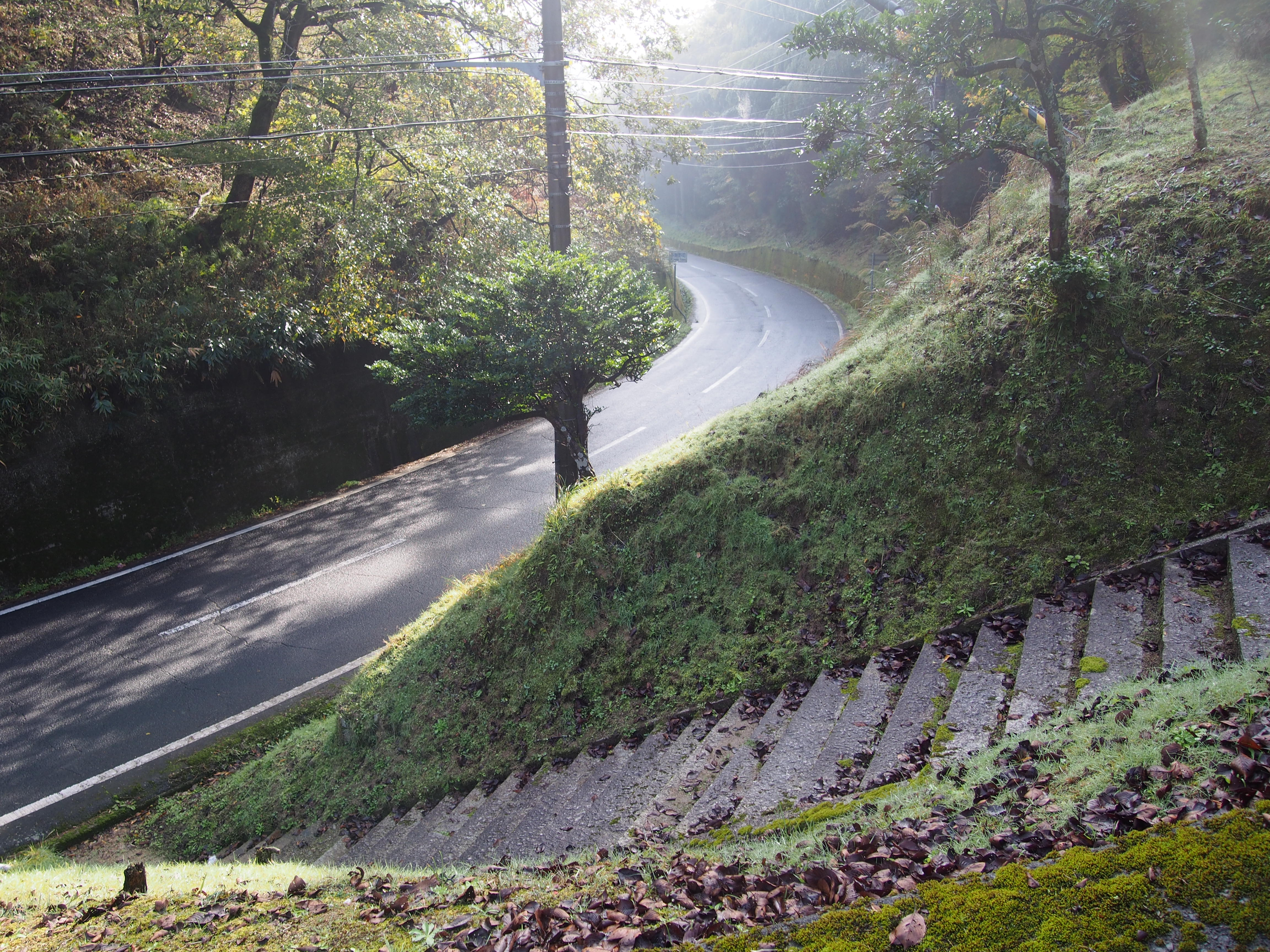 平地峠（京都府京丹後市大宮町上常吉） 平地地蔵のある地蔵院より与謝野町側を臨む。